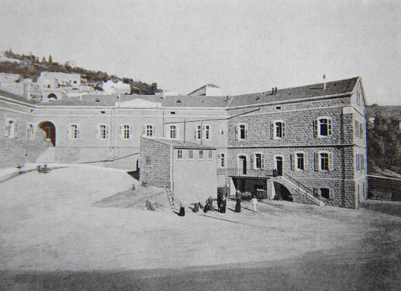 Внутренний двор Сергиевского подворья ИППО в Назарете. 1907 г.